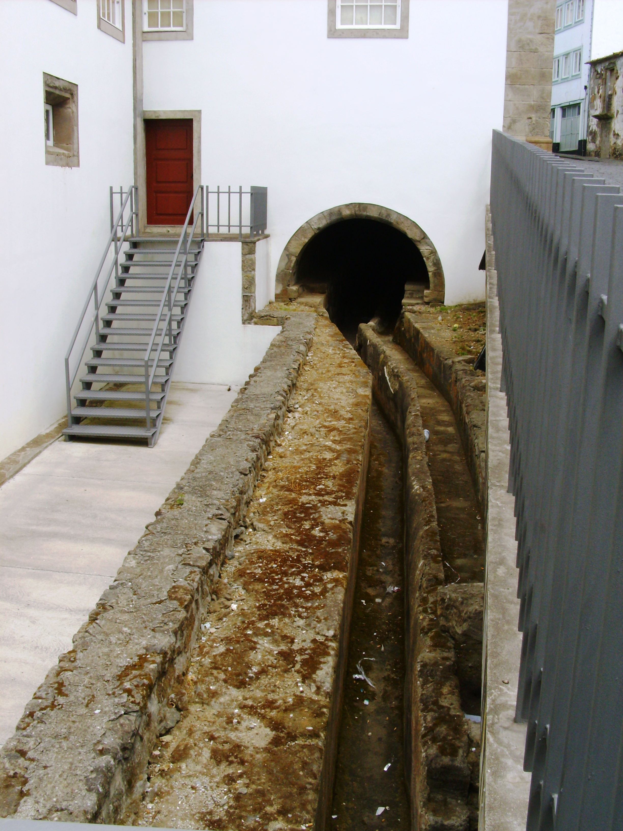 Convento de São Francisco, Angra do Heroísmo, Ilha Terceira, Açores: detalhe das canalizações do antigo sistema hidráulico que integrou a chamada "Ribeira dos Moinhos".